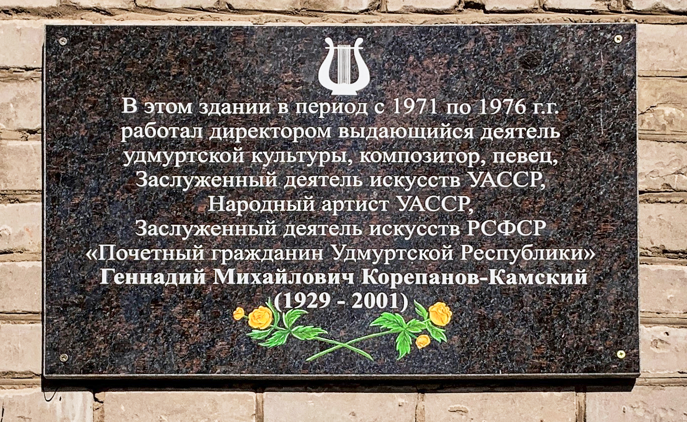 Мемориальная доска на стене Музыкального колледжа в Ижевске